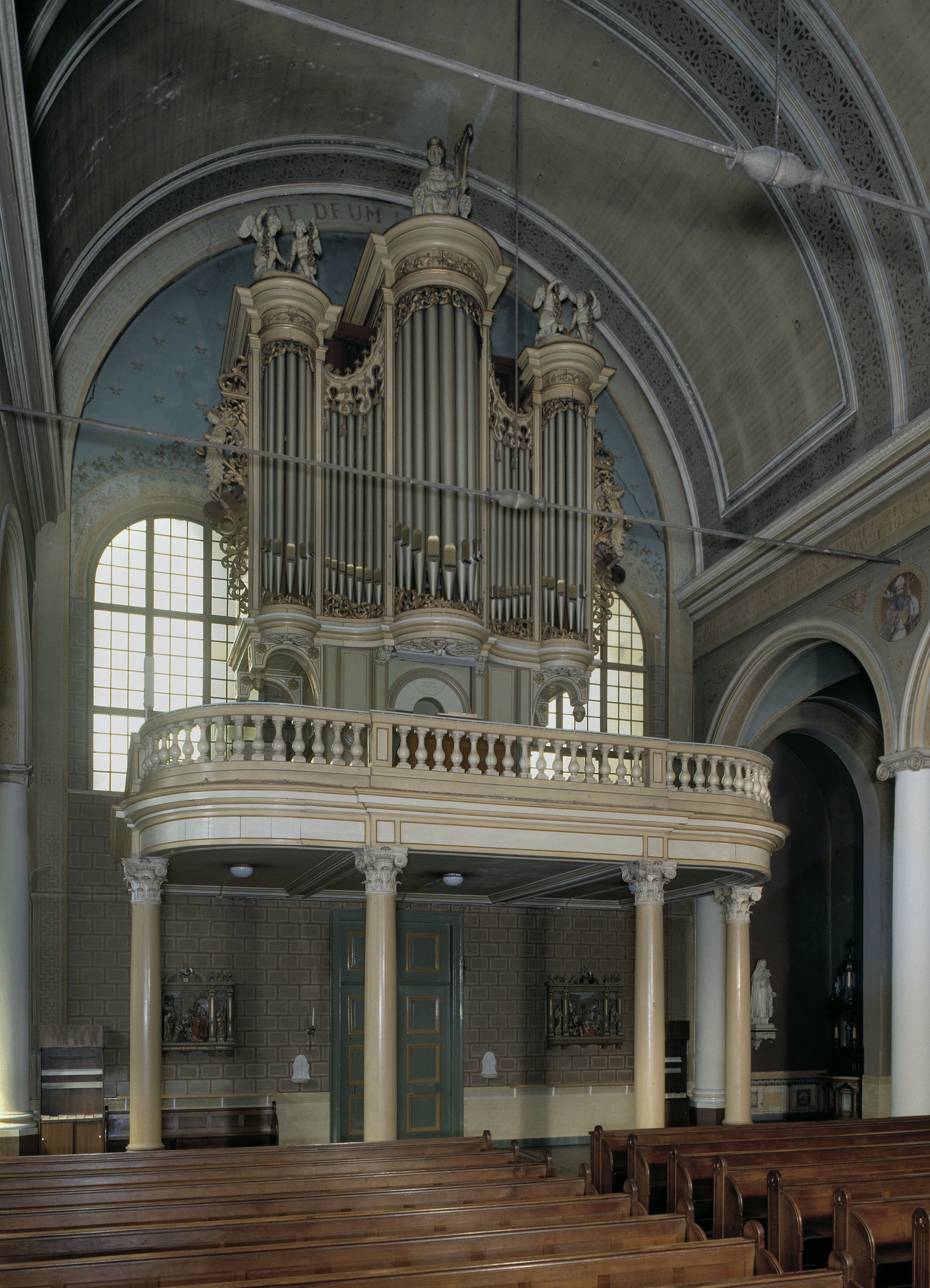 Rooms-katholieke Sint-Josephkerk: Interieur, aanzicht orgel, orgelnummer 2095 (opmerking: Gefotografeerd voor Het Historische Orgel in Nederland 1850-1858)